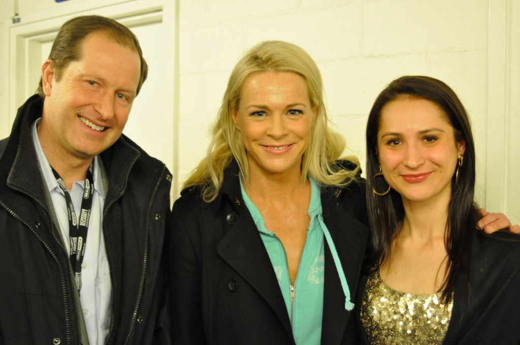 Evan Lysacek at Stockholm Ice